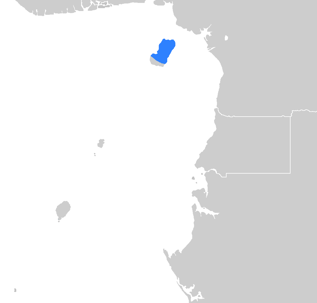 Idioma bubi